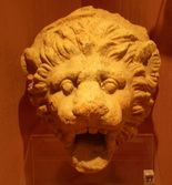 Κρήνη σε σχήμα κεφαλής λέοντα - στο Αρχαιολογικό Μουσείο Αταλάντης